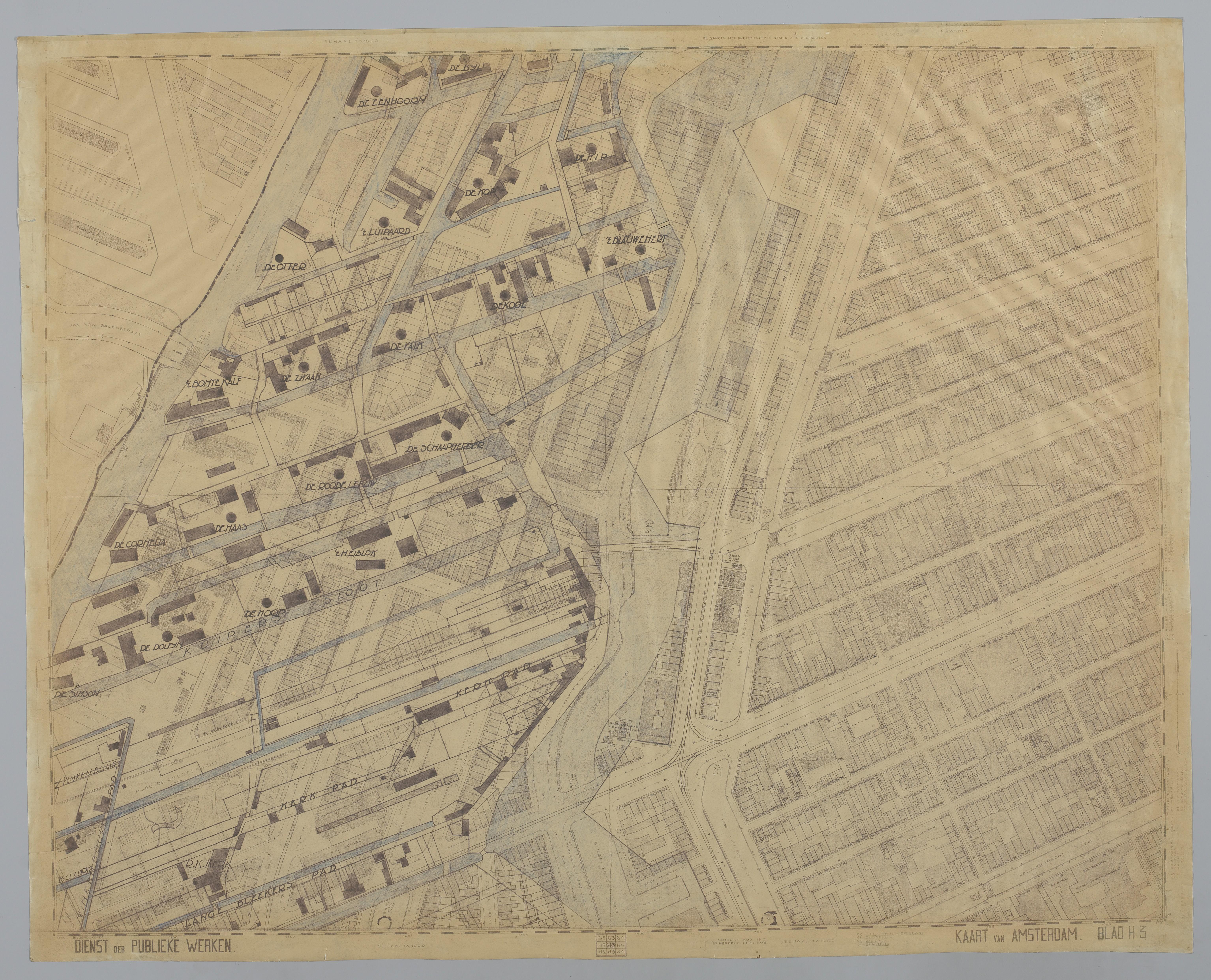 Zaagmolenbuurt en Frederik Hendrikbuurt kaarten over elkaar geprojecteerd, 1936